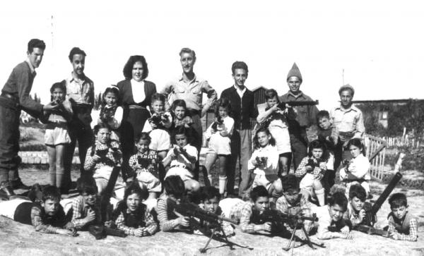 ילדי הקיבוץ משחקים בנשק של חיילי גבעתי, שהצטרפו להגנת הישוב ב 1948